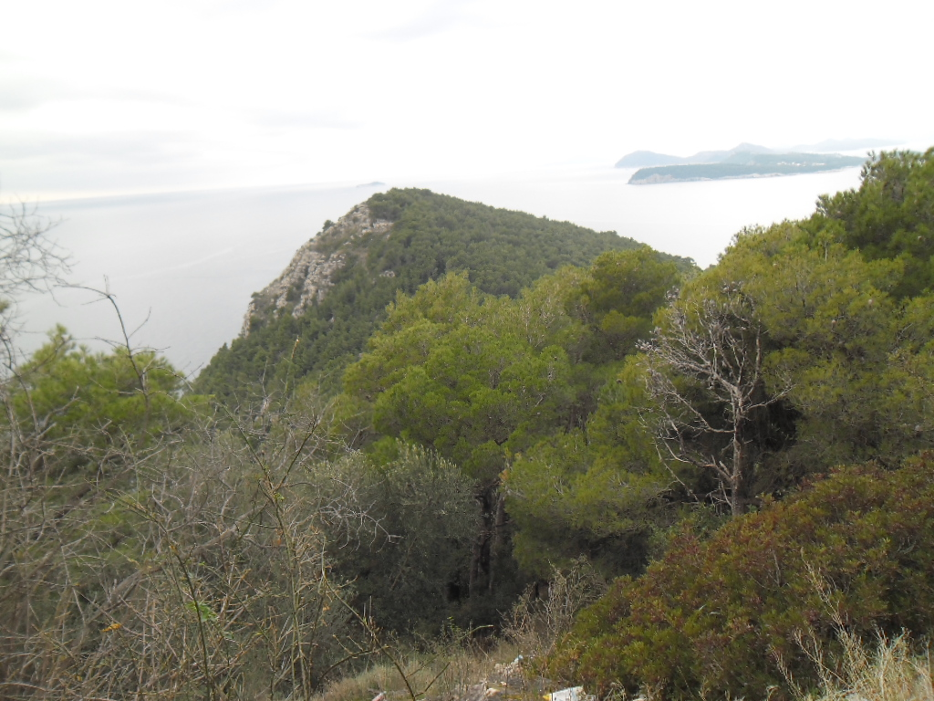 lapadske šume (Petka)